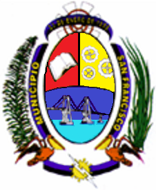 Escudo del municipio San Francisco, estado Zulia, Venezuela